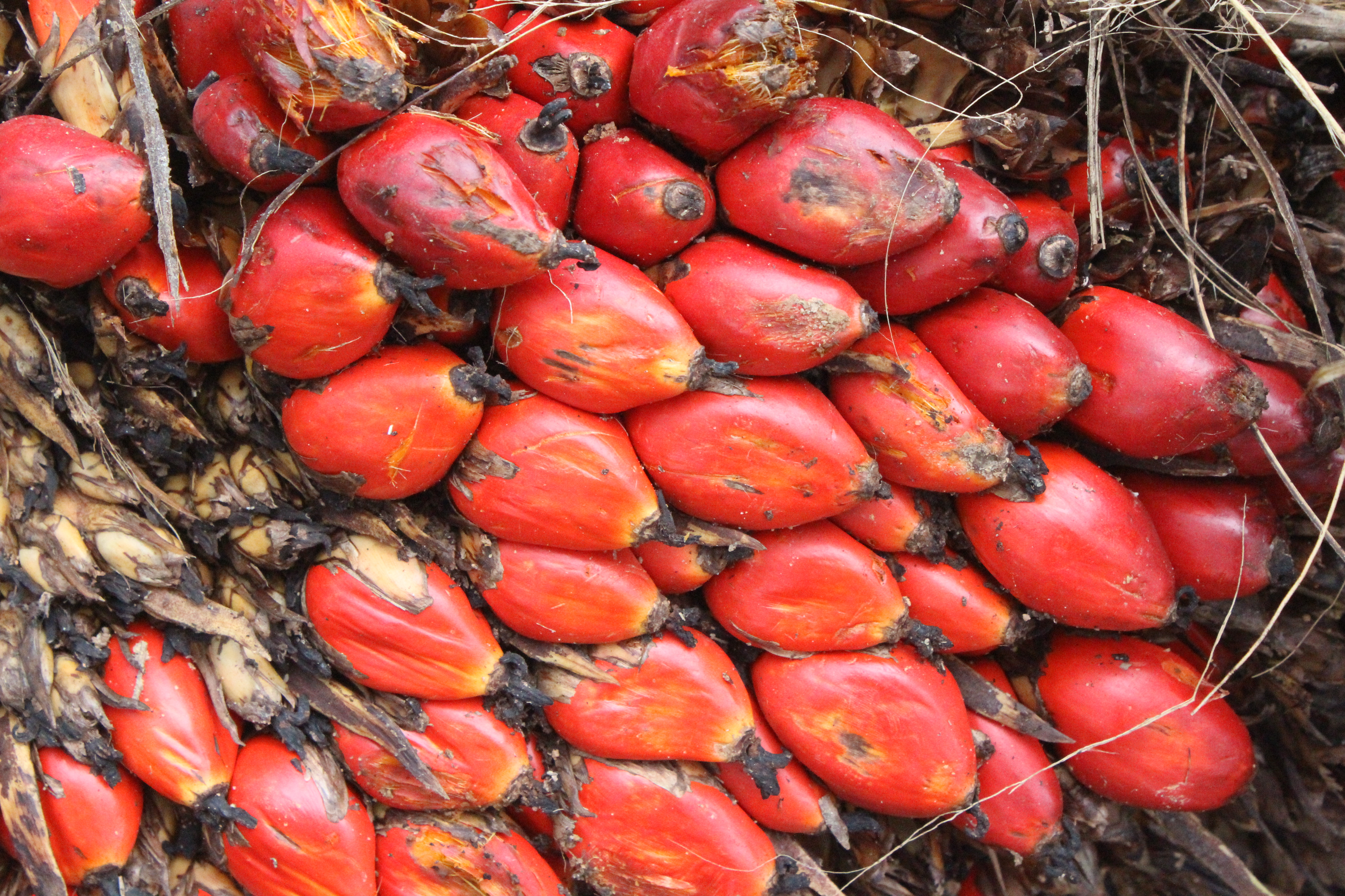 graine de palmier servant à faire une sauce